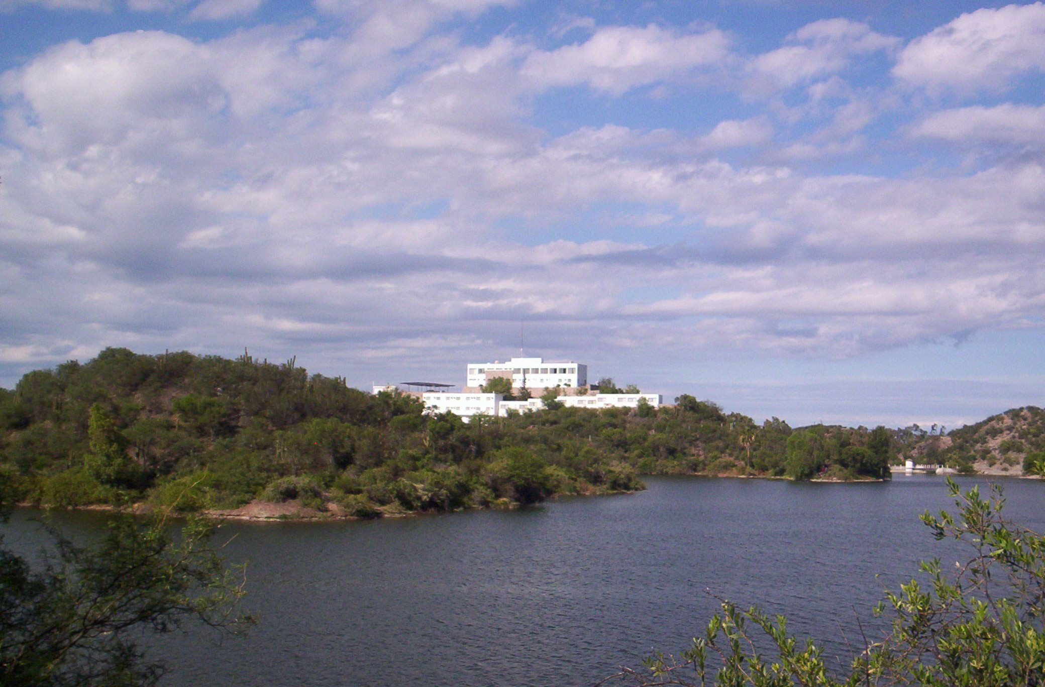 Dique San Agustín, Valle Fértil, provincia de San Juan, Argentina